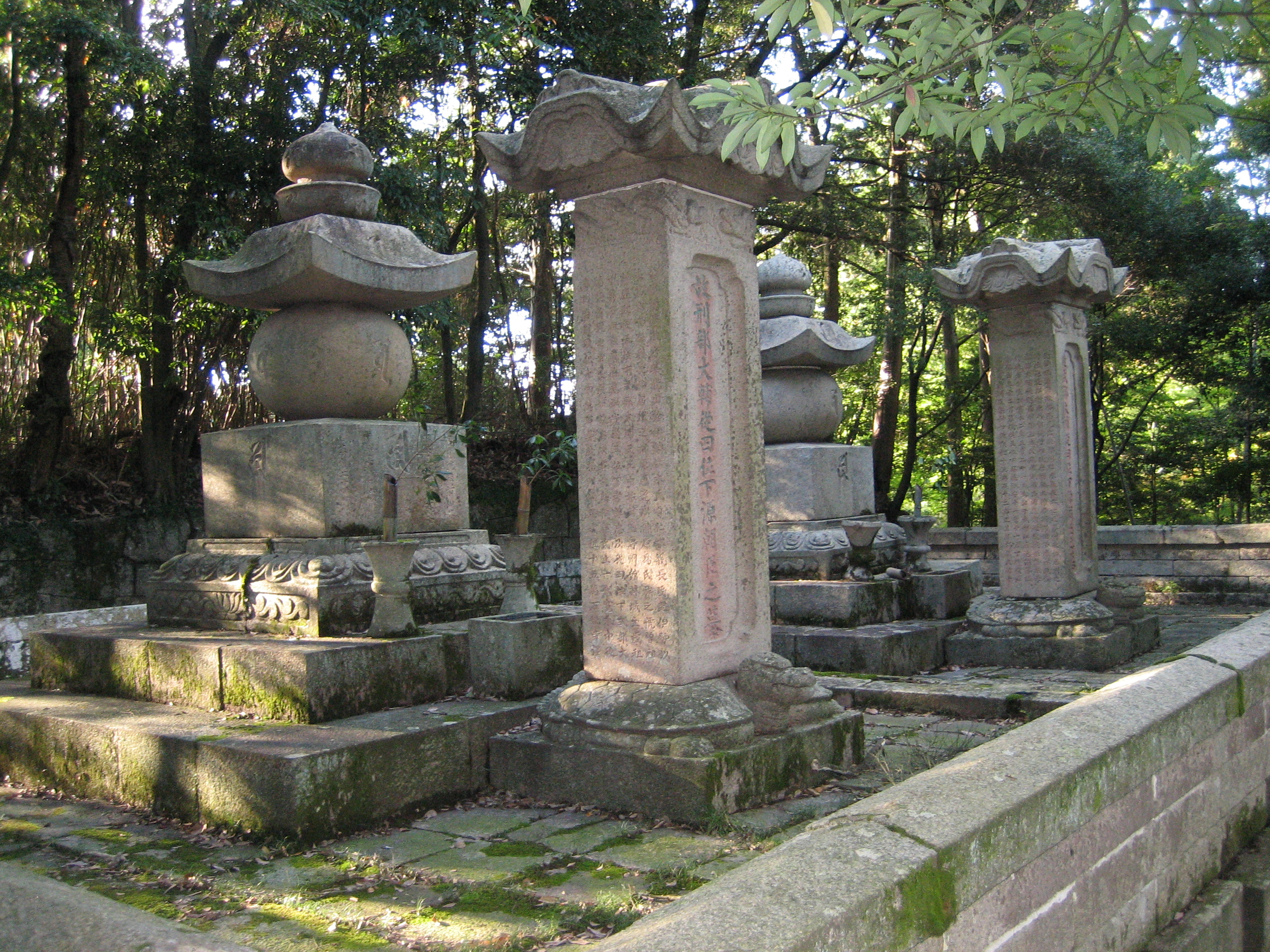 並びたつ政房(手前)と政祐の墓。ちなみのこの墓所は左側にやや傾斜している。